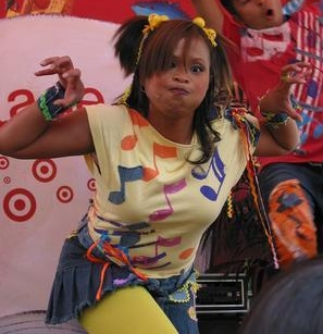 Kimee Balmilero, circa 2008.